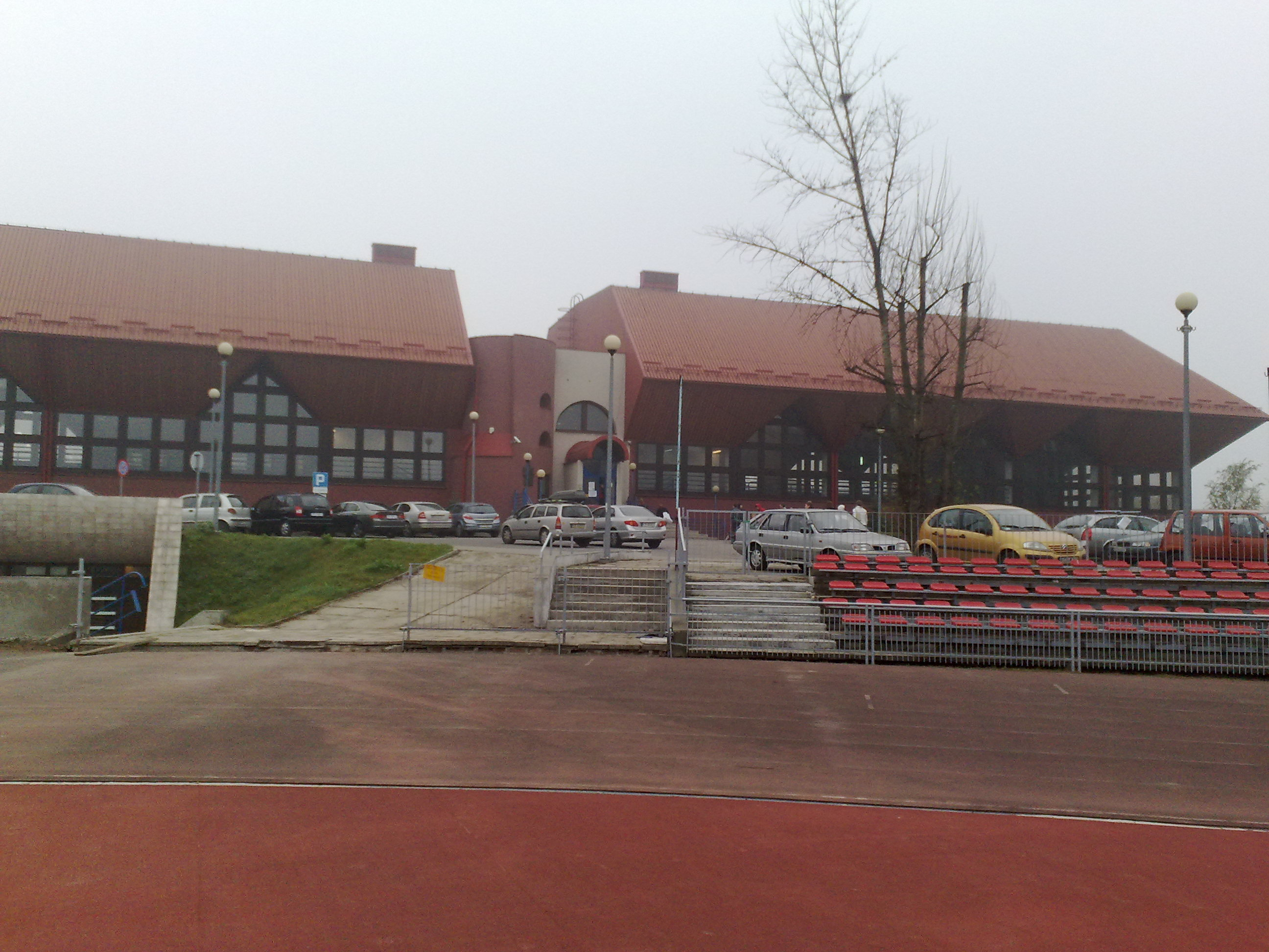 Hala Akademii Wychowania Fizycznego w Krakowie